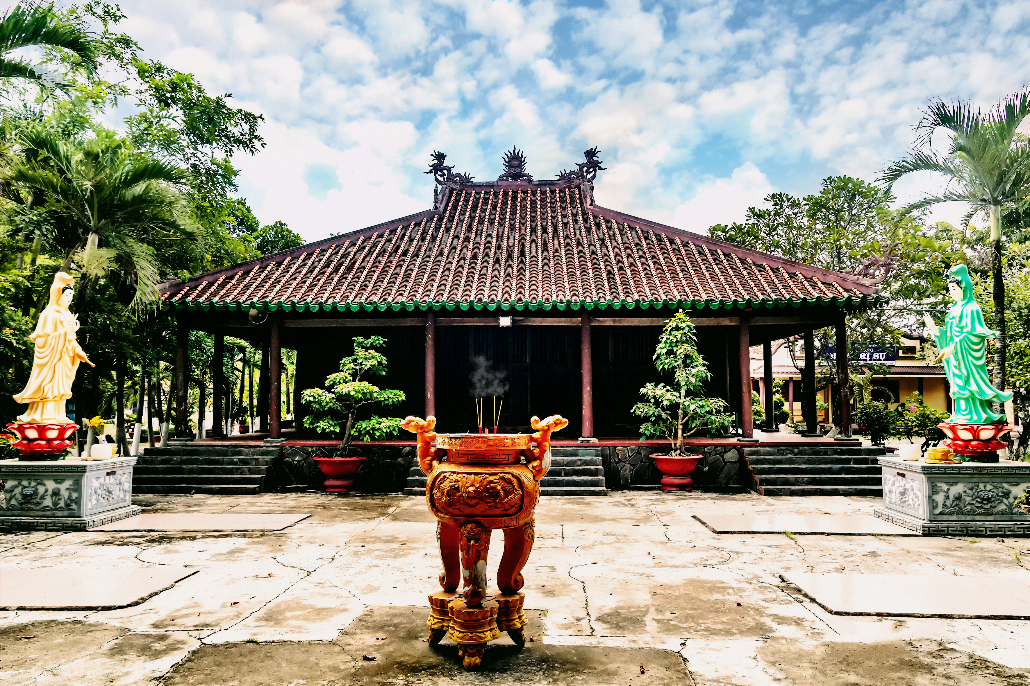 Chùa Tôn Thạnh là một cổ tự ở Long An, Việt Nam.